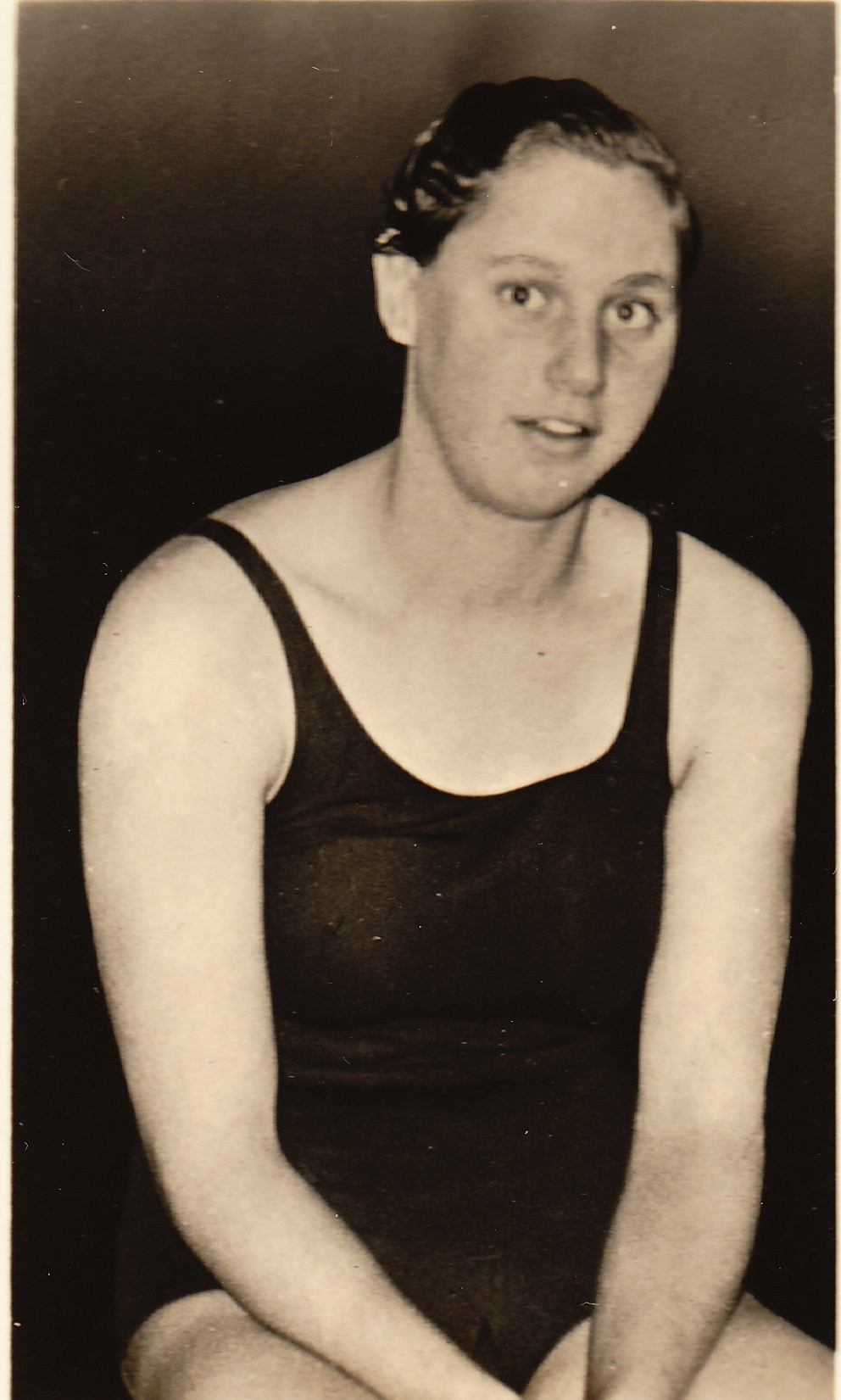 Alie Stijl behoort tot het kader der prominente Ned. zwemsters.